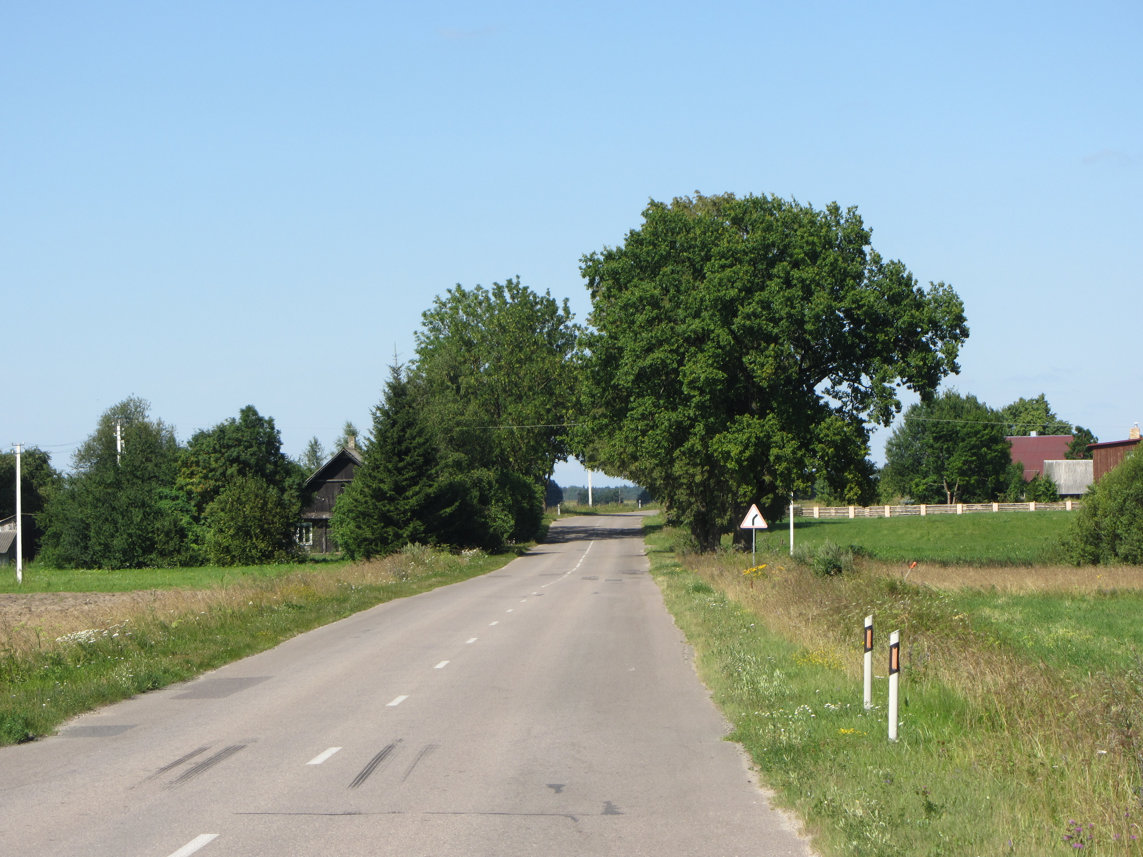 Zibalų sen., Lithuania